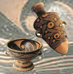 Majiayao-Keramik Selbstgefertigte Graphik nach Vorlagen aus einem alten, nicht dem Copyright unterliegenden Buch aus der VR China